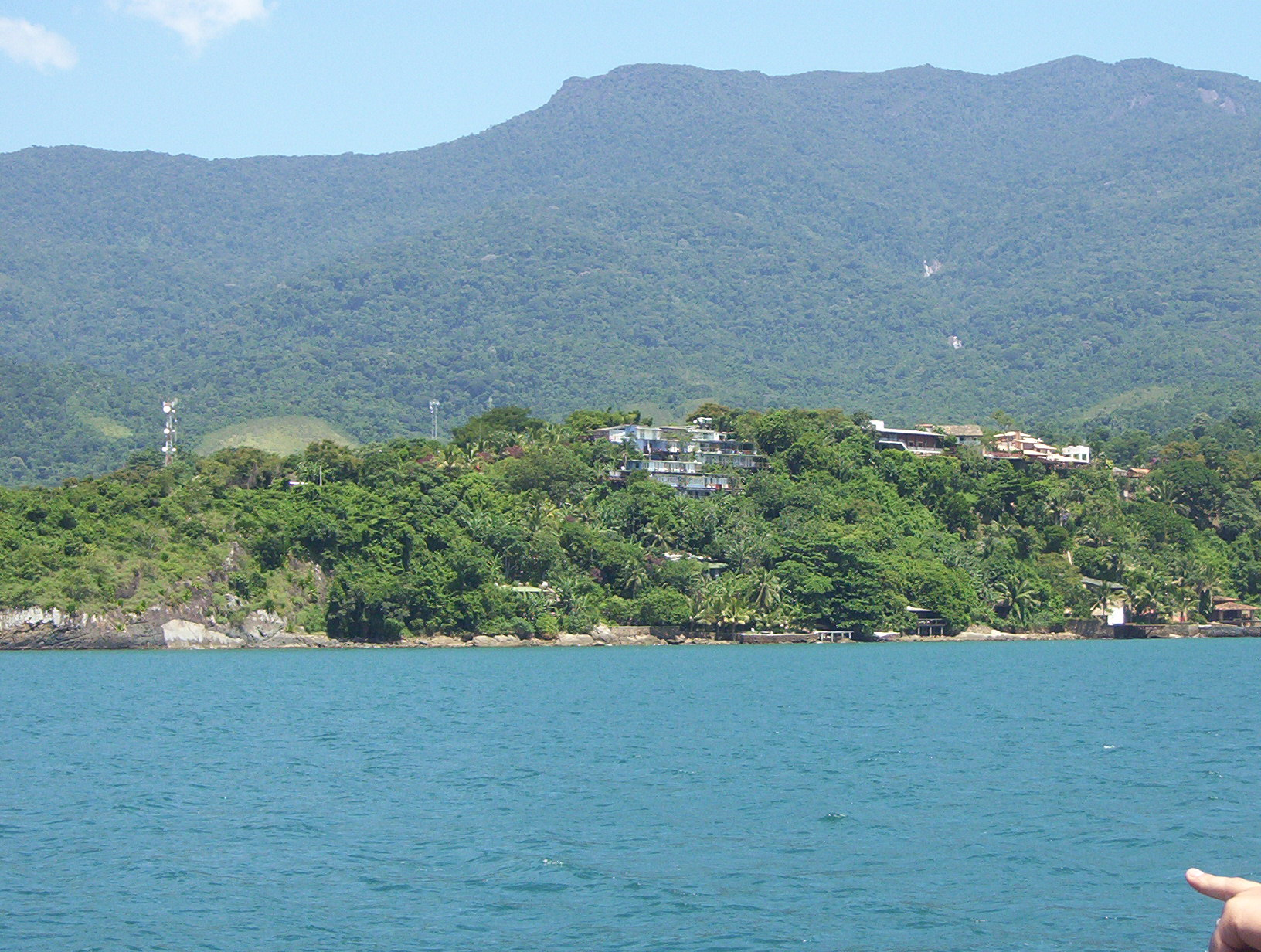 chegando